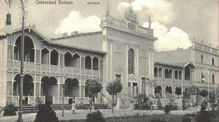 Gdańsk Brzeźno, jedyny zachowany dom zdrojowy nad polskim wybrzeżem.